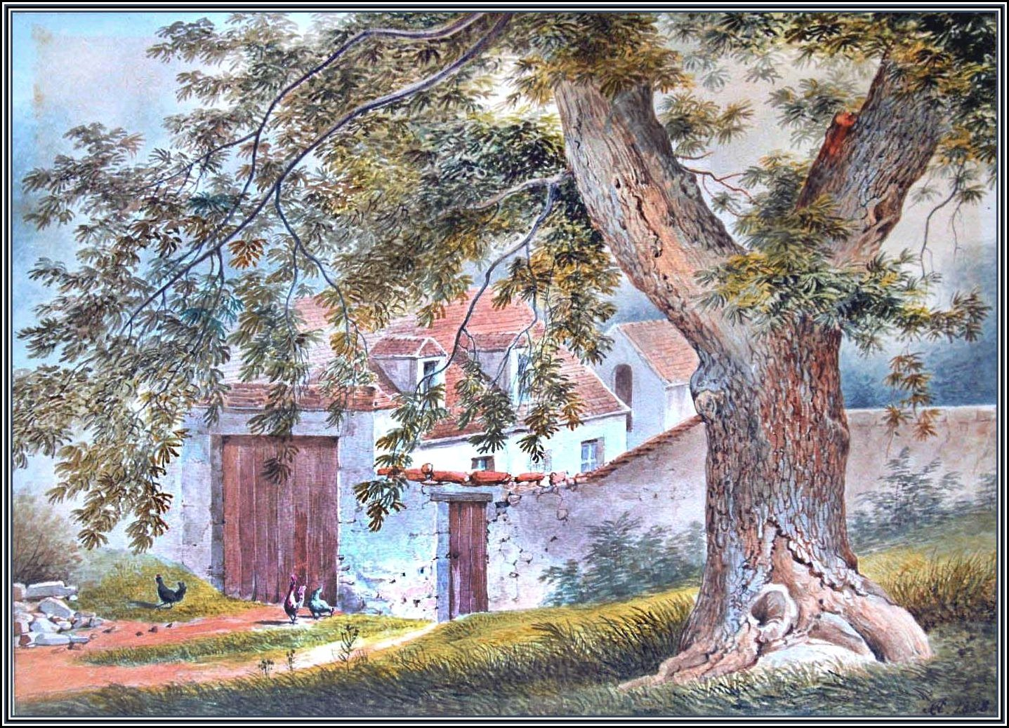 Абрахам Купер (1787-1868), "Домик в деревне"